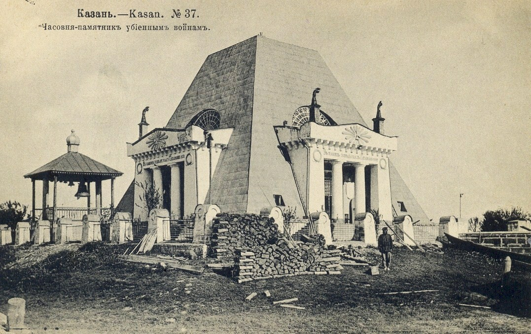 Храм-памятник воинам, павшим при взятии Казани в 1552 году (Храм-памятник в честь Нерукотворе́нного Образа Спасителя) (г. Казань). Надписи над изображением (на лицевой стороне открытки): «Казань. – Kazan. № 37. Часовня-памятникъ убiеннымъ войнамъ». Надписи на оборотной стороне открытки: «Открытое письмо. – Carte Postale. Адресъ. Шереръ, Набгольцъ и Ко., Москва.».